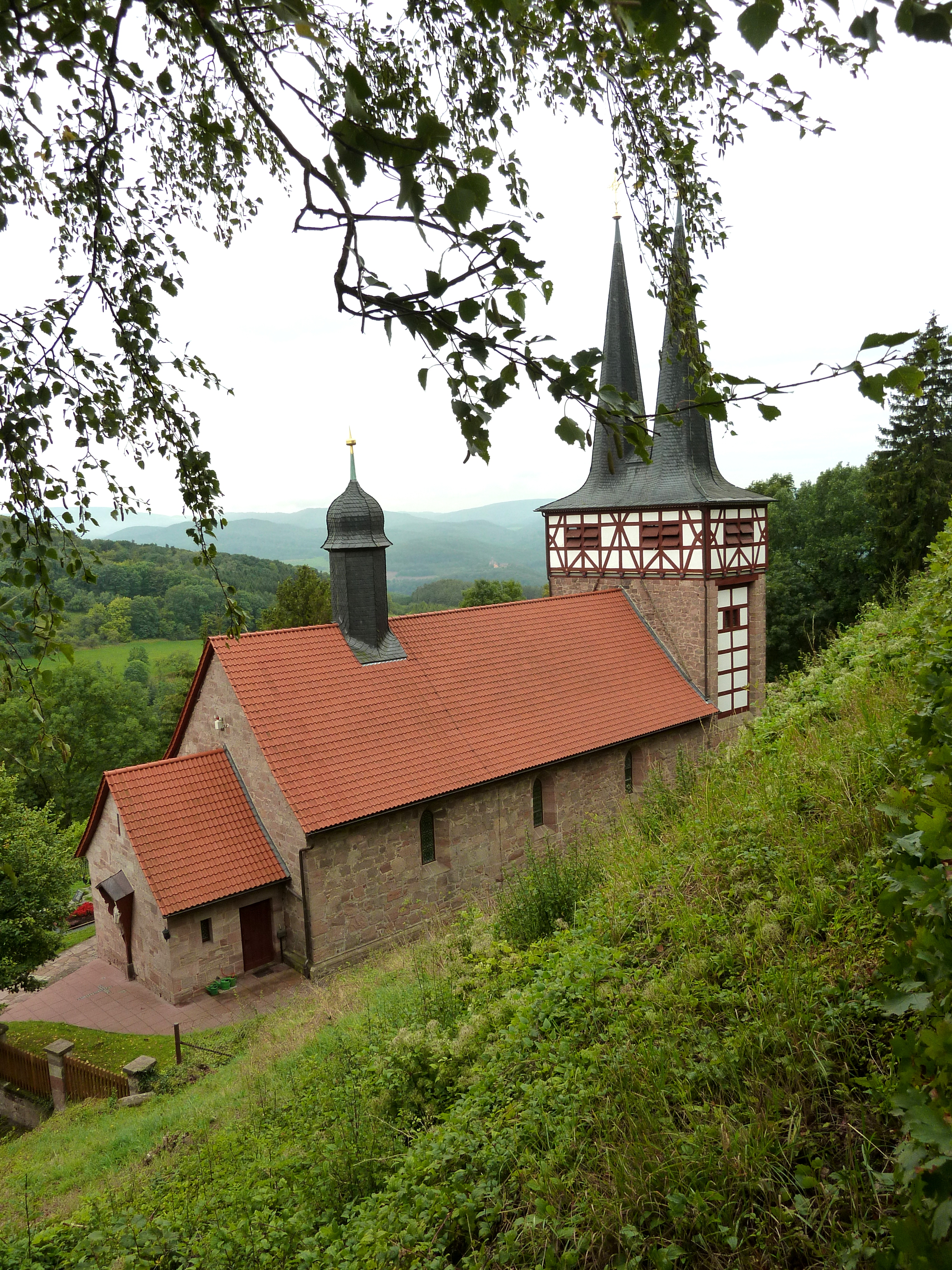 Katholische Kirche in Rimbach, Gemeinde Bornhagen, Thüringen. Der Mater dolorosa (Schmerzhaften Mutter) Maria geweiht.